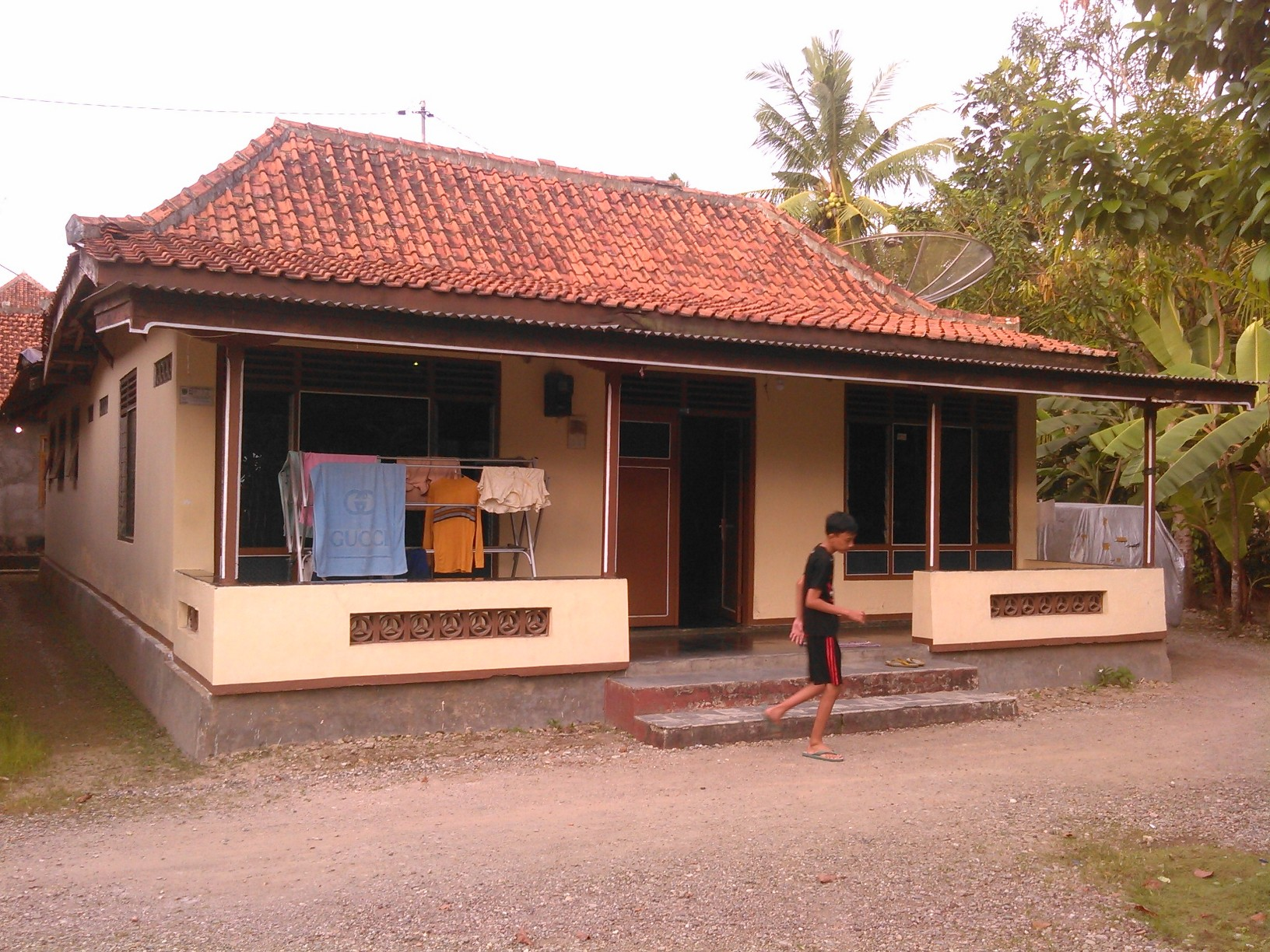 Salah satu rumah penduduk di RT. 05 / RW. I, Desa Karangtanjung, Alian, Kebumen, Jawa Tengah